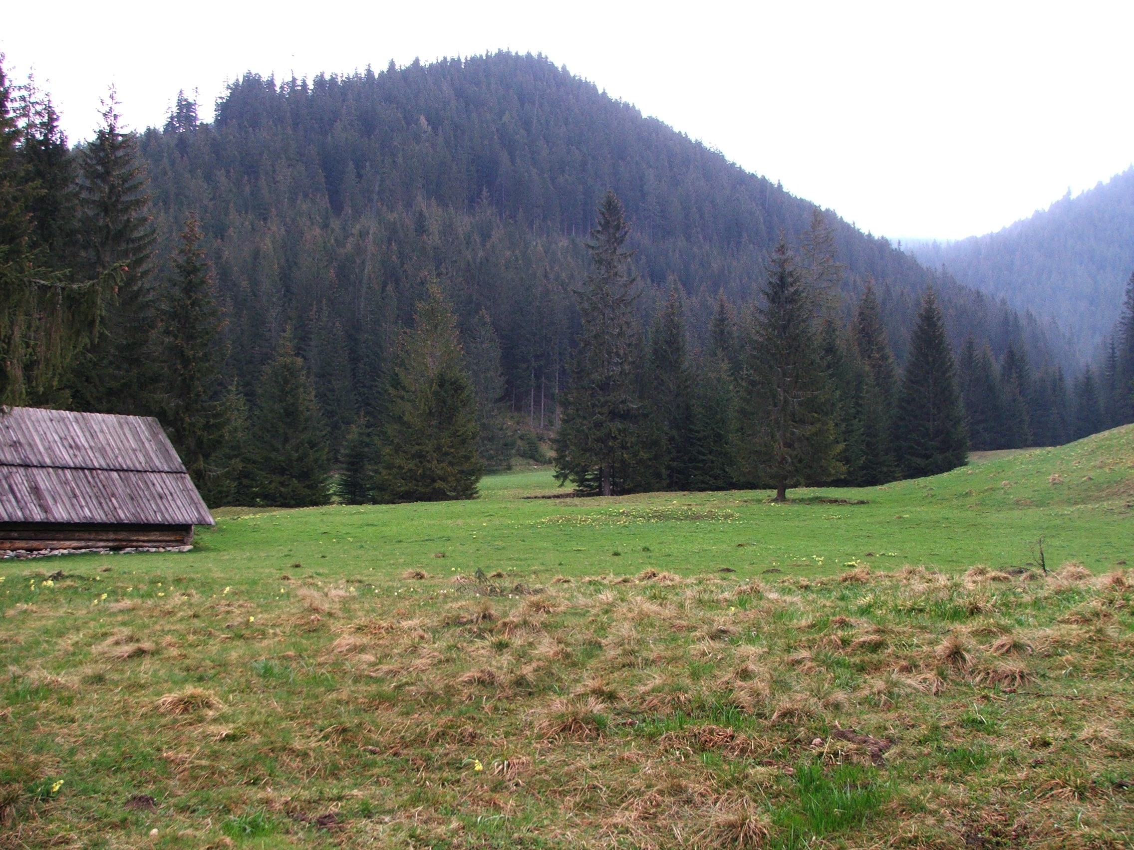 Polana Huciska w Dolinie Chochołowskiej i Klinowa Czuba